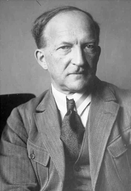 Dr. Georg Graf von Arco, der Mitbegründer und Förderer des deutschen Funkwesens tritt in den Ruhestand. Porträt Graf von Arco, welcher in 62 Jahre alt, von seinem Posten als Direktor der Telefunkengesellschaft zurück tritt.